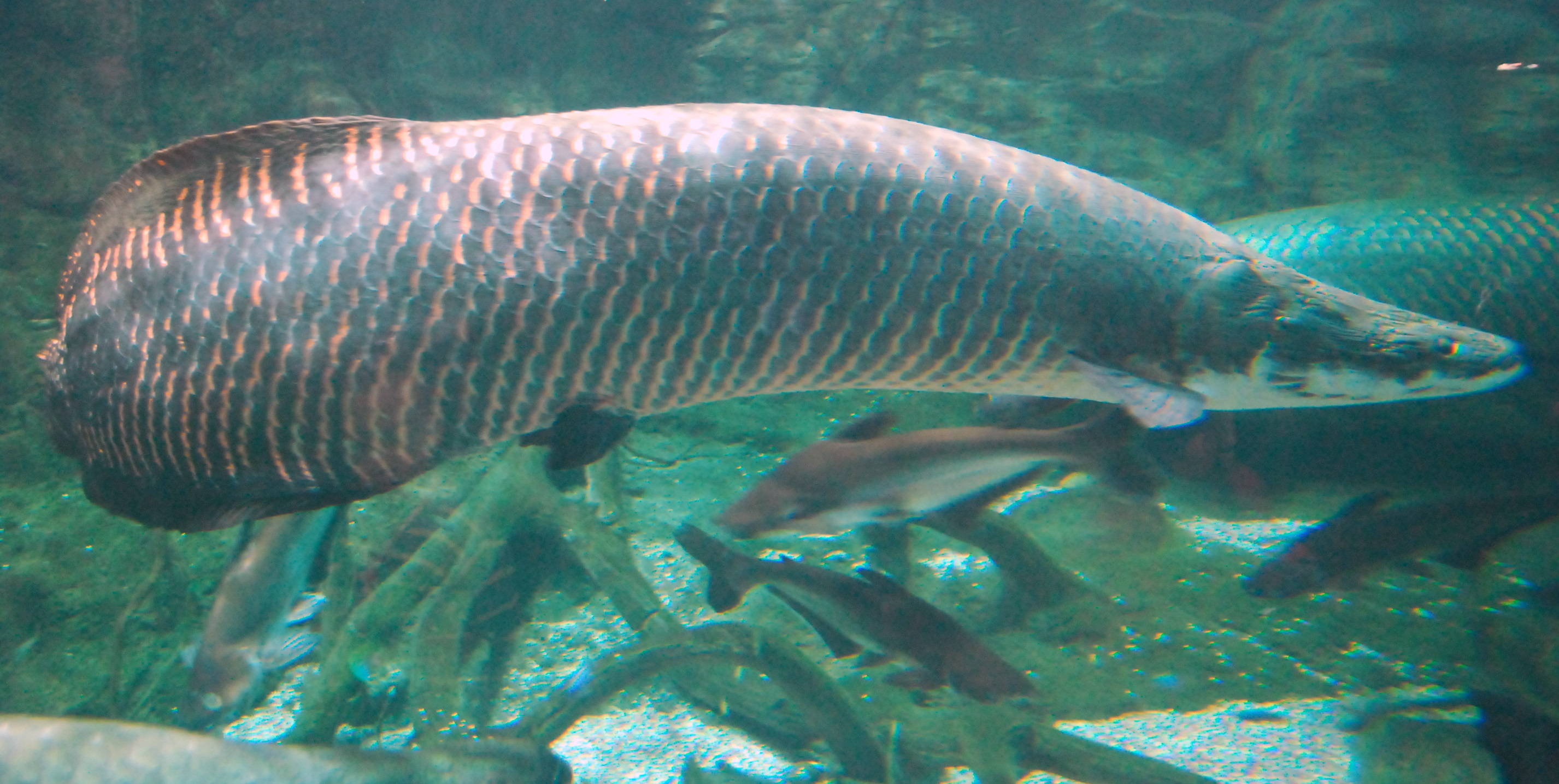 北京海洋馆的巨骨舌鱼